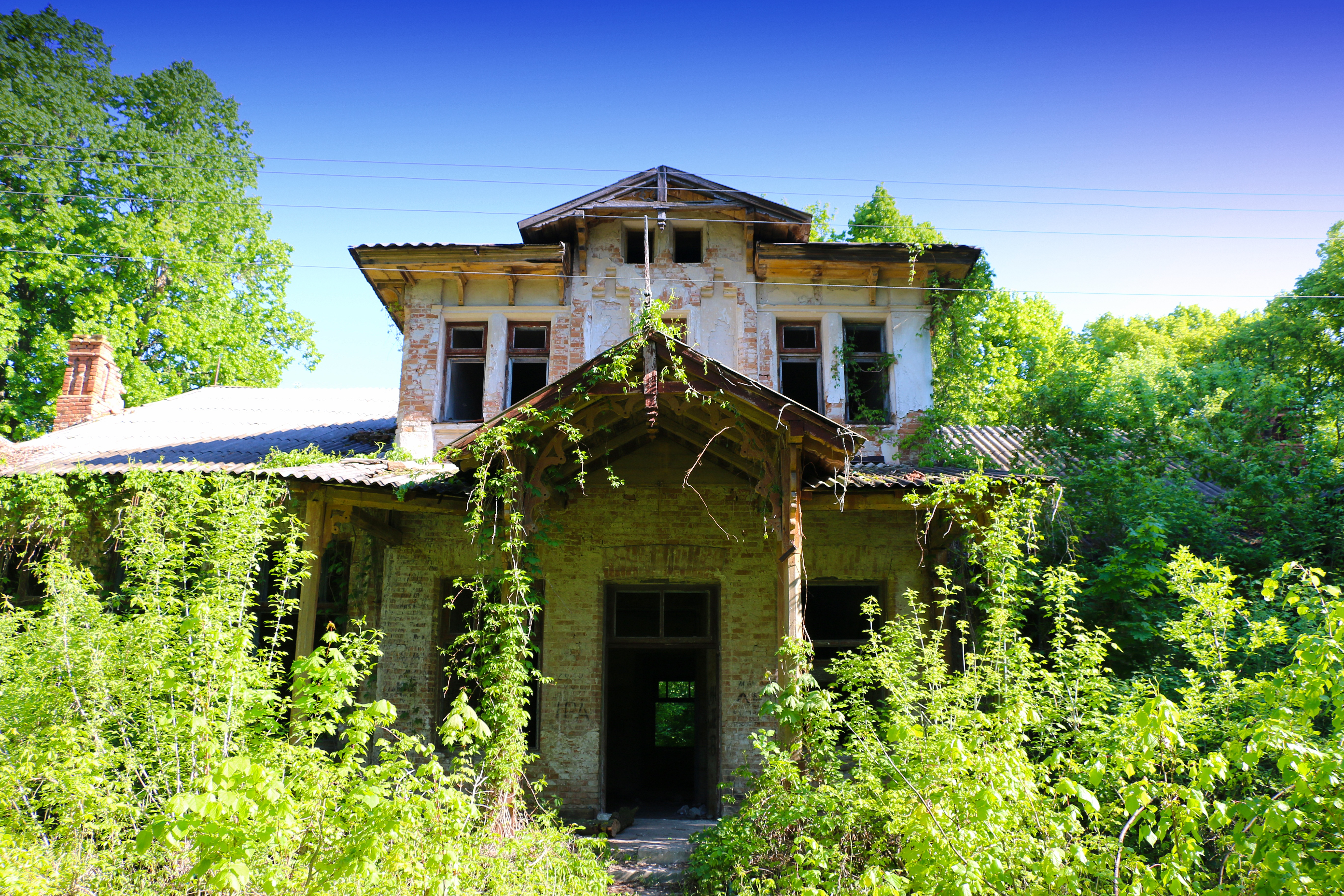 Будинок управителя, Чагів, вул. Заїки